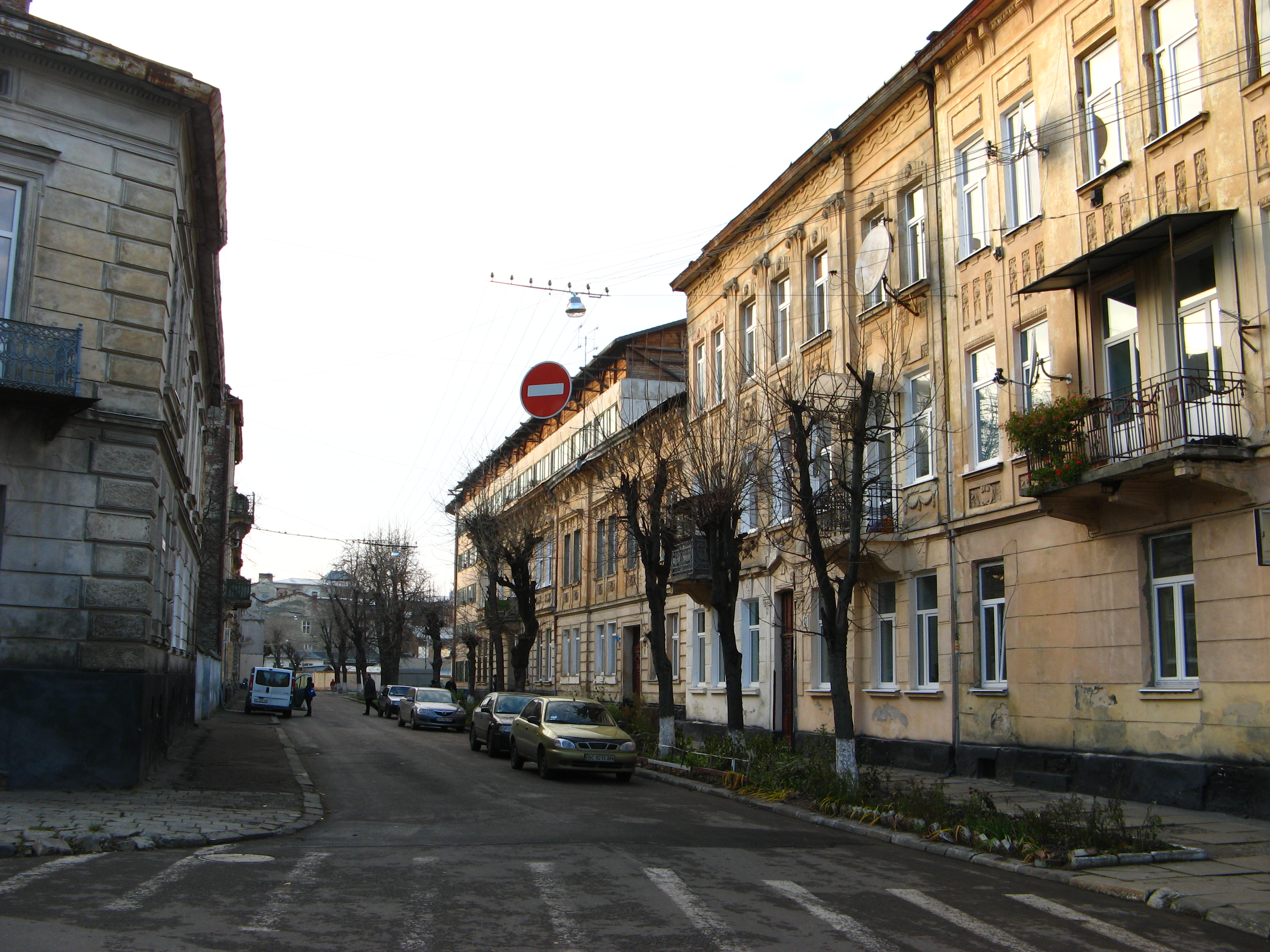 Заводська_вул._(Львів)